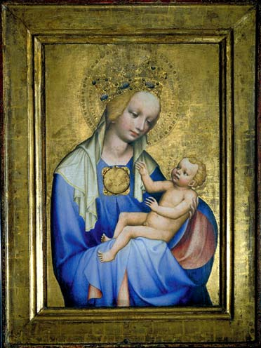 MADONA ROUDNICKÁ